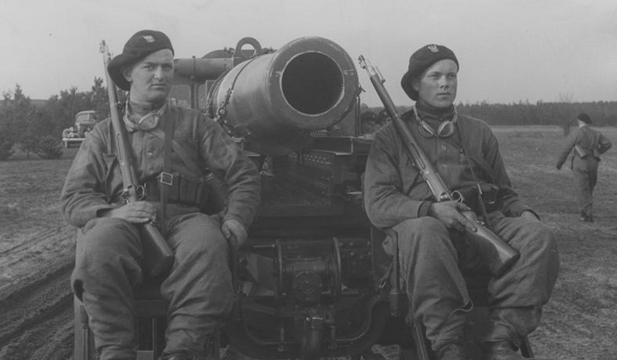 Lufa moździerza 220 mm wz.32 na przyczepie. Widoczna obsługa uzbrojona w karabiny karabinki Mauser 7,92 mm wz. 1898.